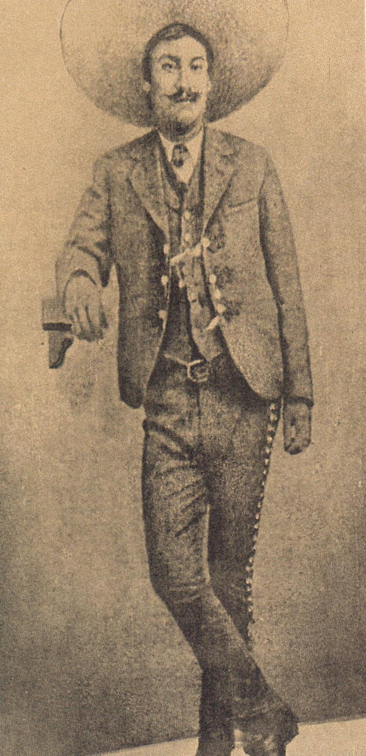 General Sabino Burgos